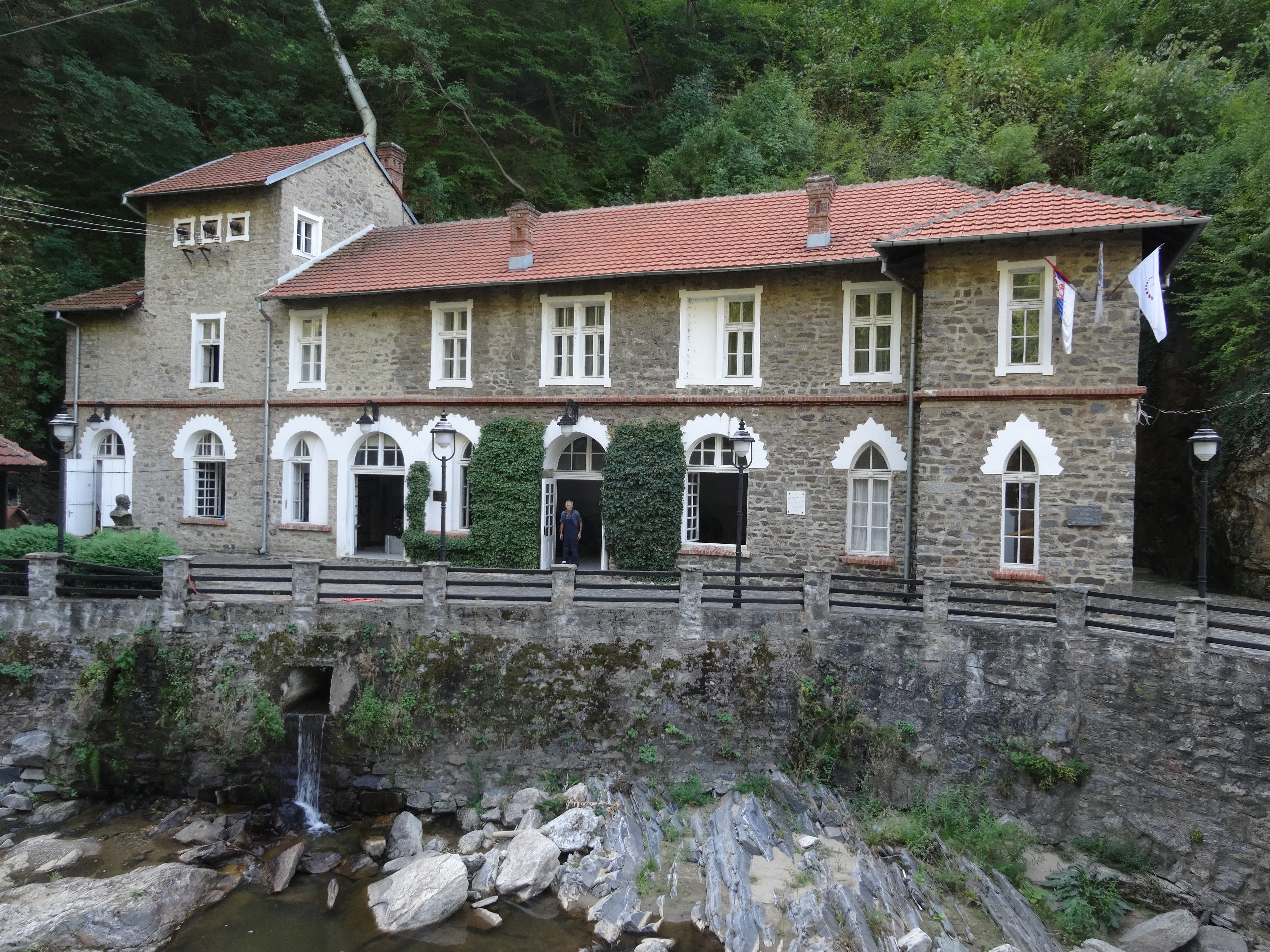 Hidrocentrala Vučje, Leskovac